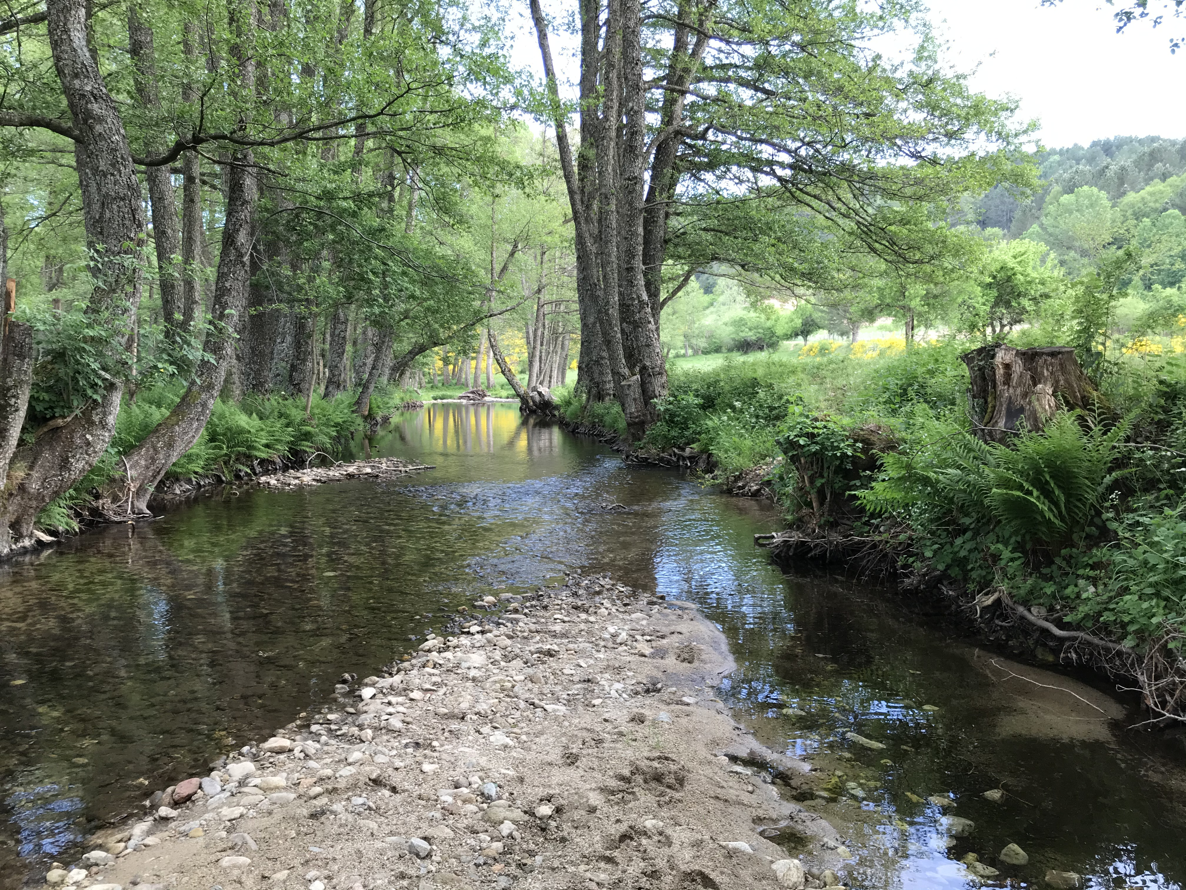 Fiume Neto in Sila